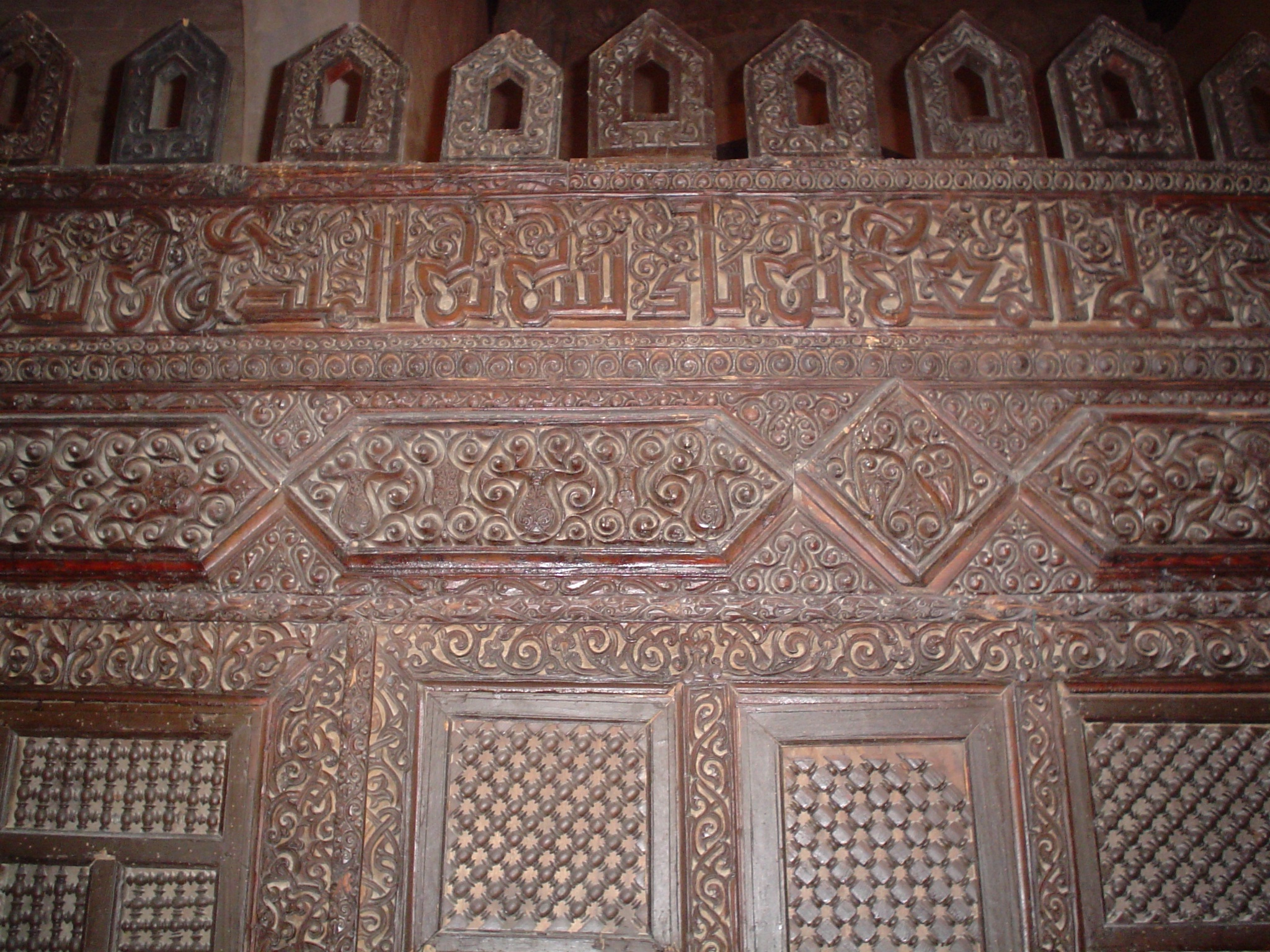 Ornements et bandeau épigraphique de la maqsura en bois sculpté de la Grande Mosquée de Kairouan, en Tunisie.